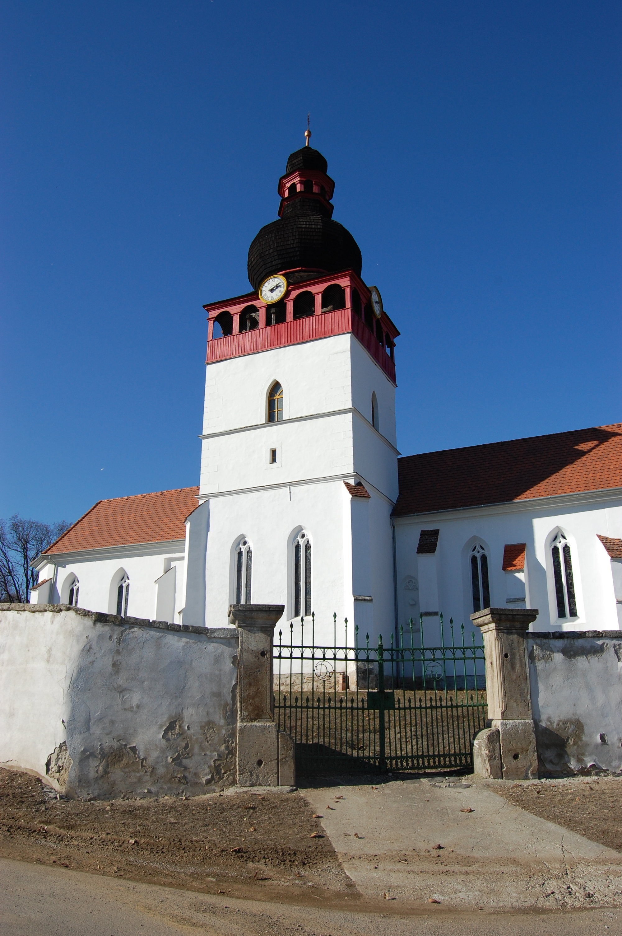 Tolcsva, Bajcsy-Zsilinszky Endre u. - R.k. templom, gótikus, 14. sz. Bővítve és átalakítva a 18-19. sz.-ban. törzsszám 1372 This is a photo of a monument in Hungary. Identifier: 3278